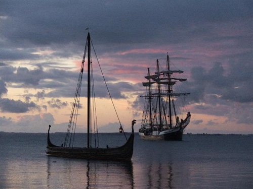 Vikingeskibet Imme Gram af Tønder Skibslag